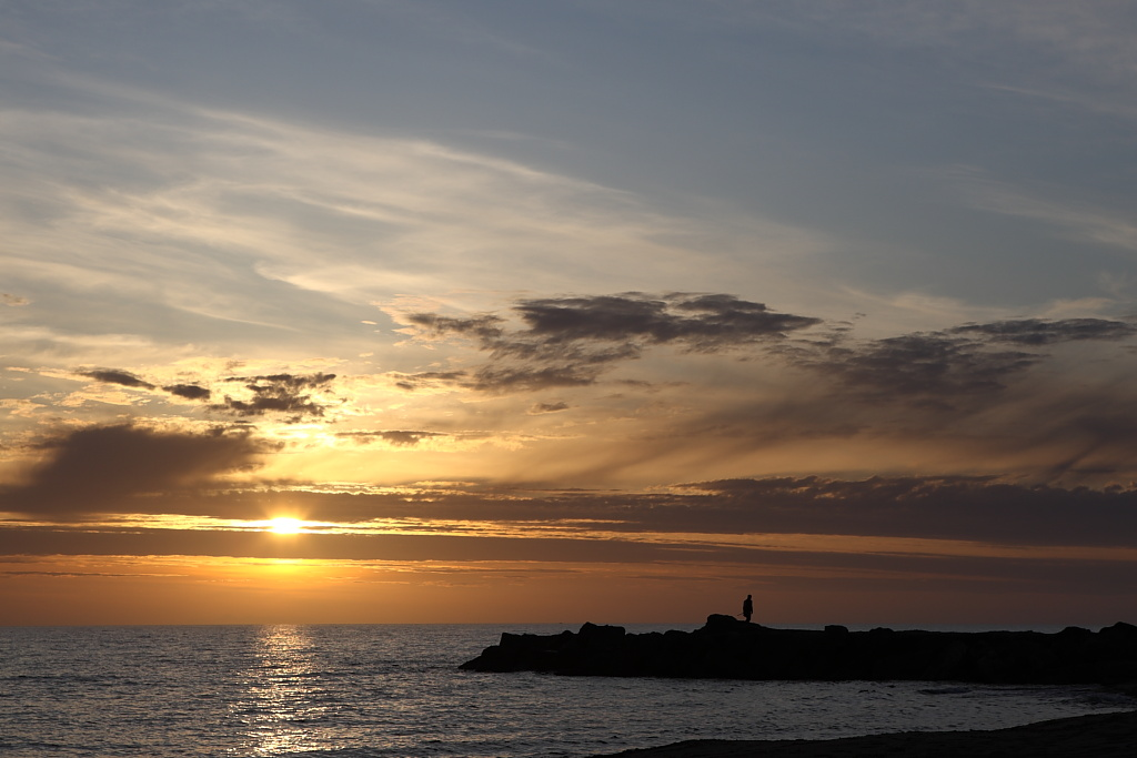 tramonto sul mare, TS Giovanni, Ugento